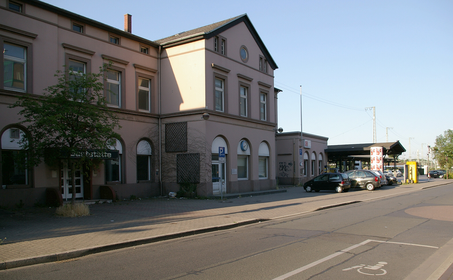 Bildbeschreibung: Unna (Nordrhein-Westfalen), Bahnhof Suedseite, vor dem Umbau 2007/2008. Quelle: Eigenes Foto Fotograf/Zeichner: Smial Datum: 17.07.2006